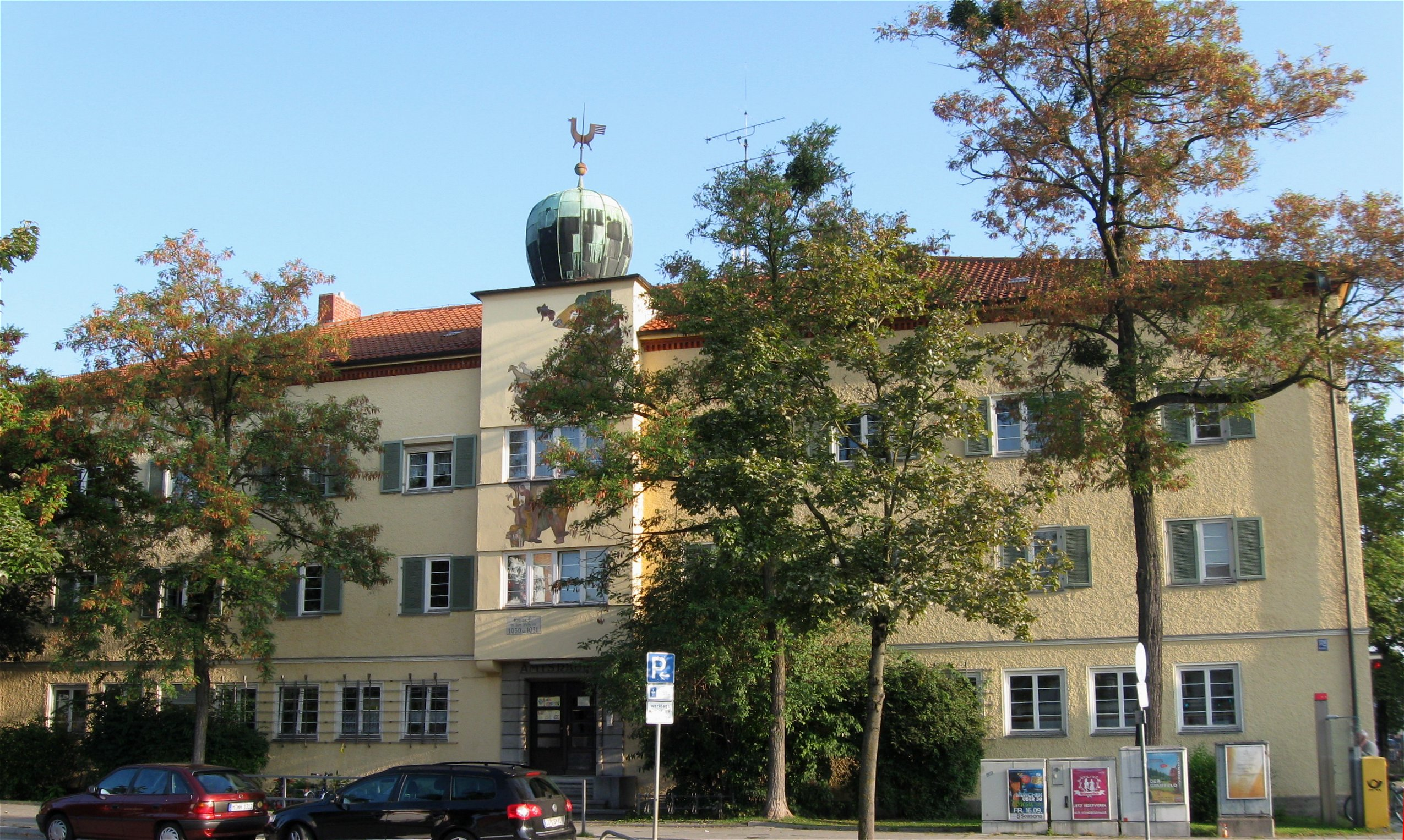 Würmtalstraße 126; Ehem. Rathaus Großhadern, 1930-31 von Ludwig Zwingmann, Versuch einer Verbindung von sachlichem und traditionellem Bauen.